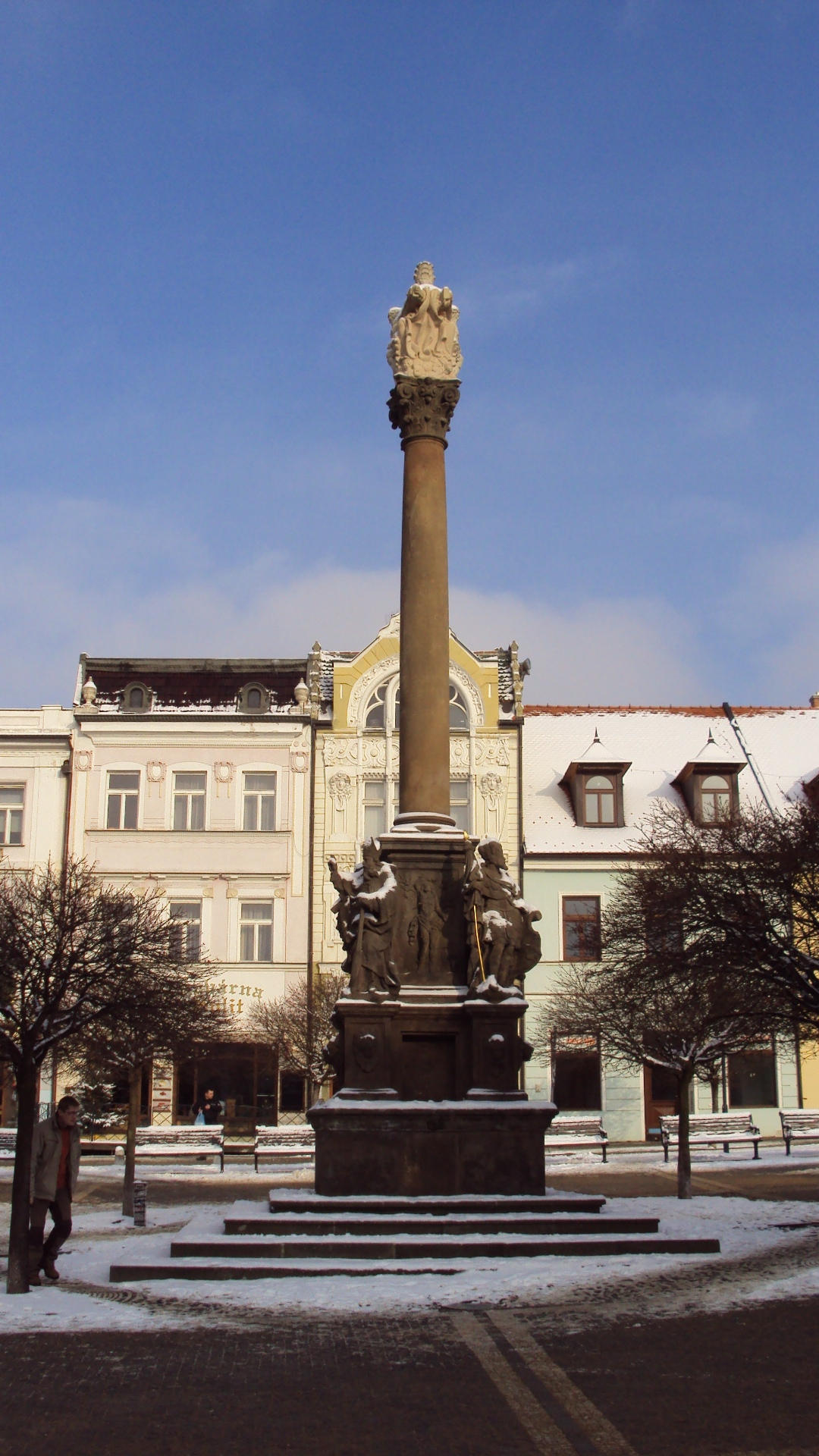 Morový sloup je na náměstí T.G.Masaryka v centru České Lípy